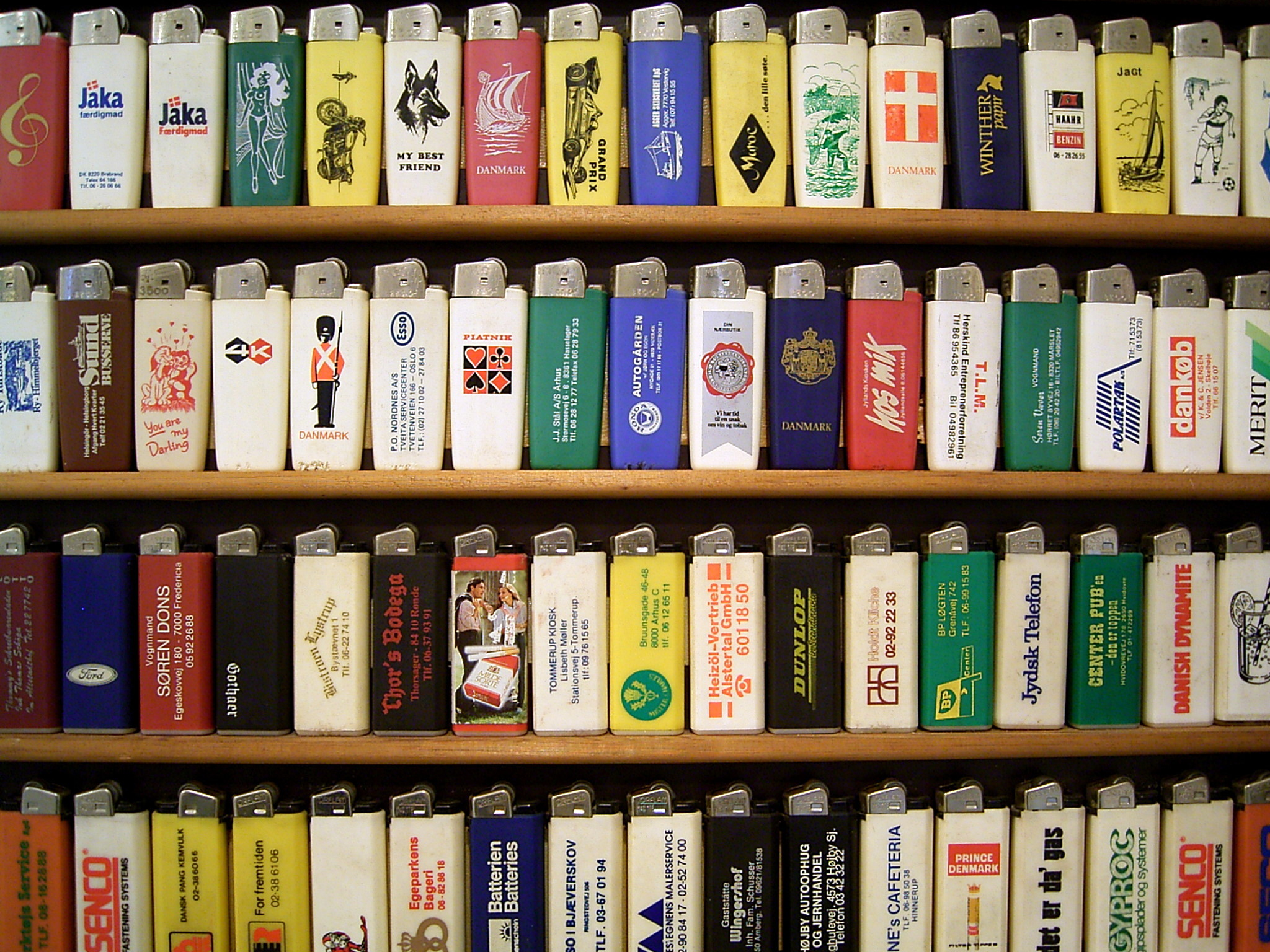 Gasmuseum in Hobro